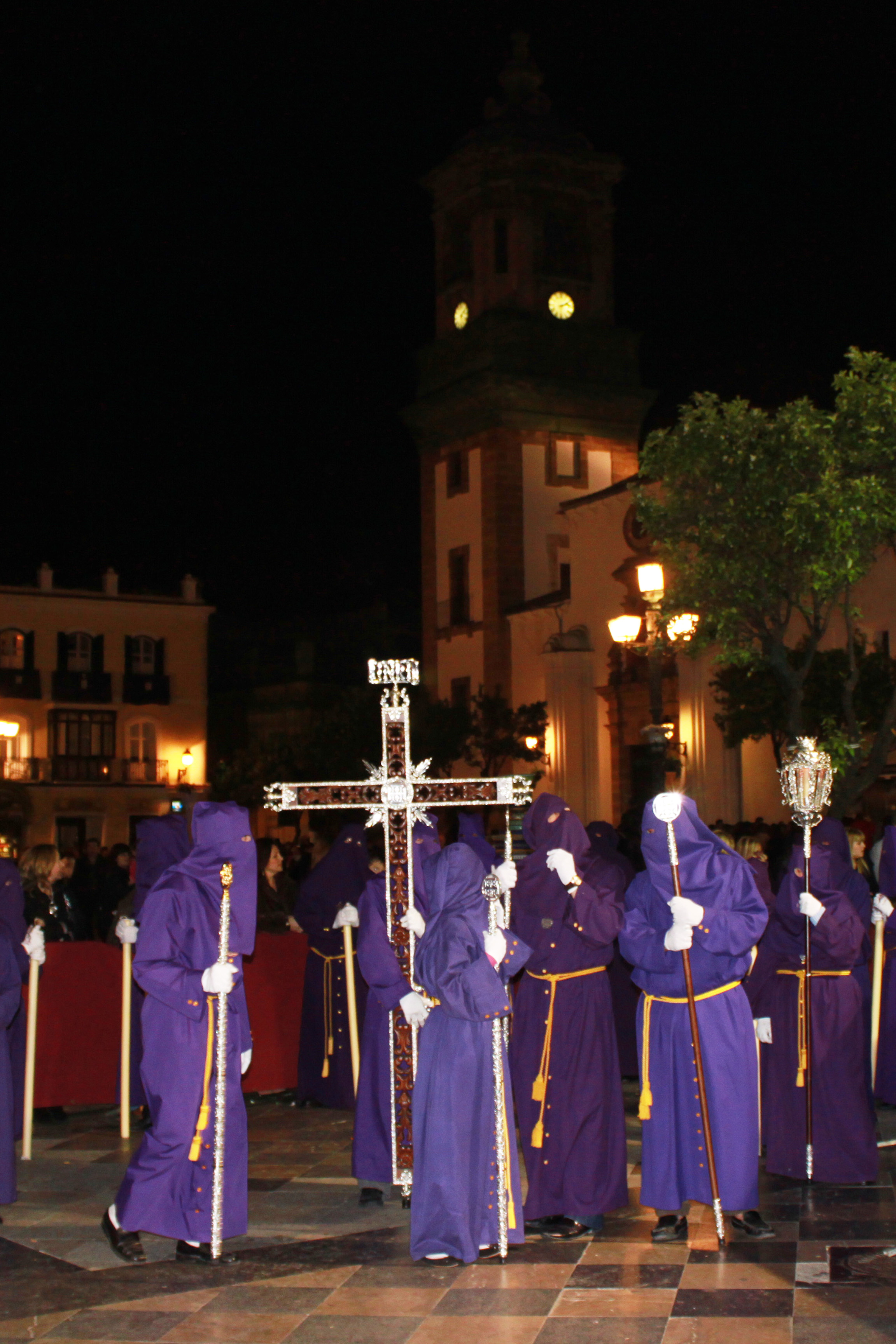 Cruz de guía del Cristo de la Fe de Algeciras a su paso por la Plaza Alta durante la Semana Santa de 2010. Algeciras, Andalucía, España.